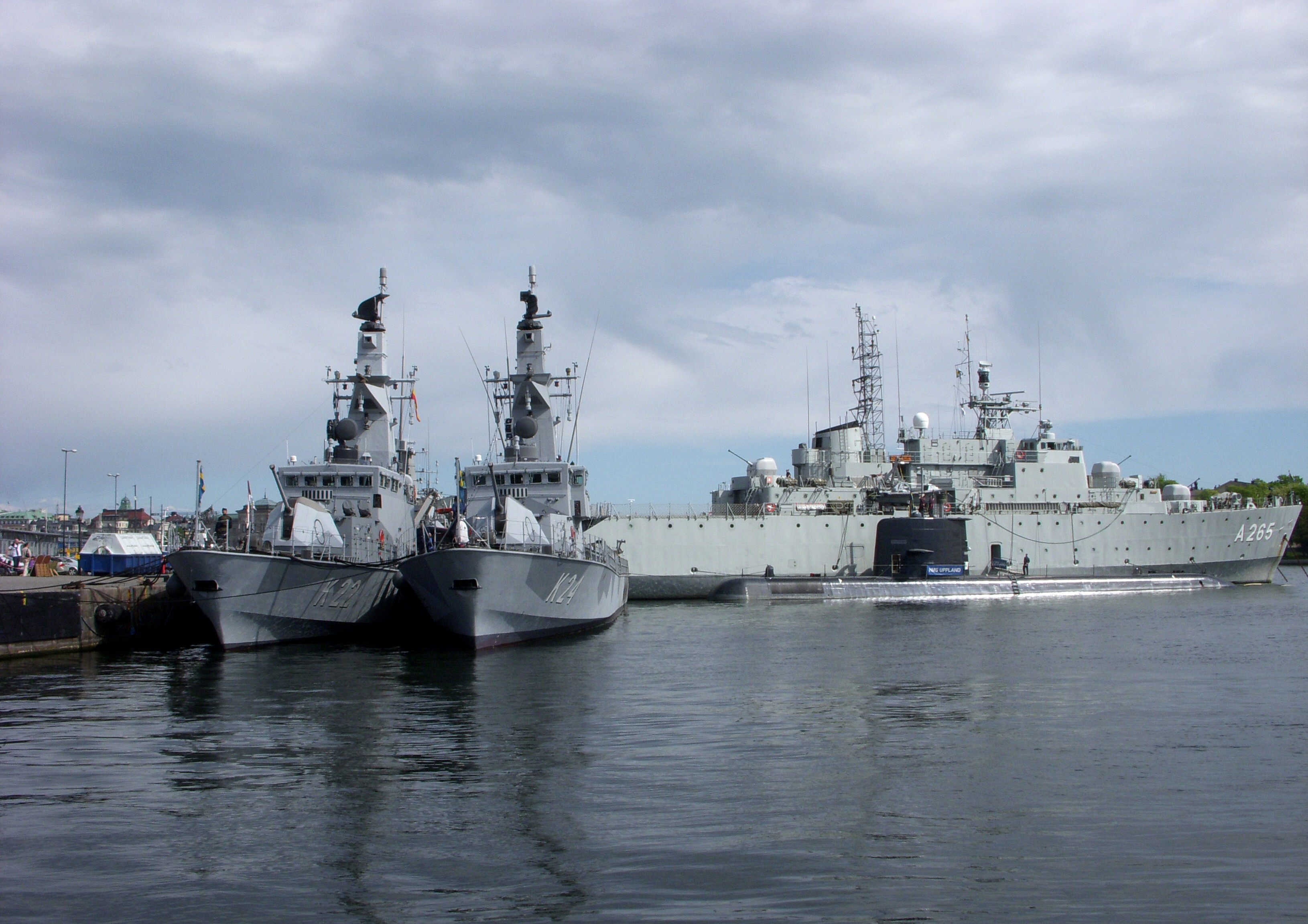 Marinen vid Skeppsbron, Stockholm med minfartyget HMS Visborg (A265), ubåten Uppland (Upd), korvetterna HMS Gävle (K22) och HMS Sundsvall (K24).